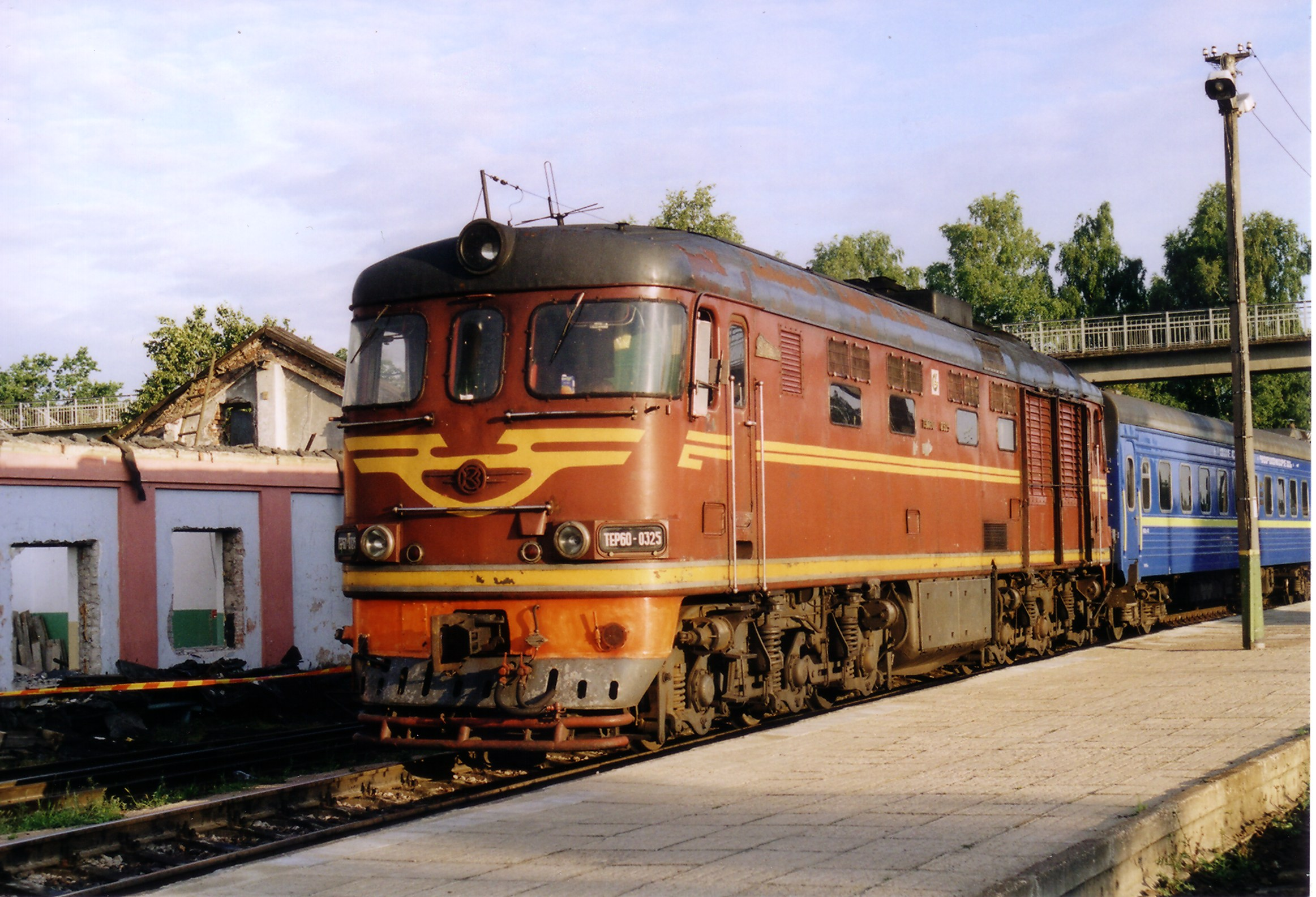 TEP60 teplovoz in Radiviliskis, Lithuania